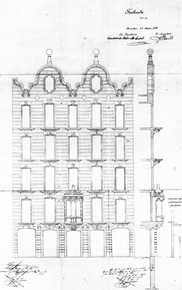 Fachada de la Casa Calvet, de Antoni Gaudí (1898).